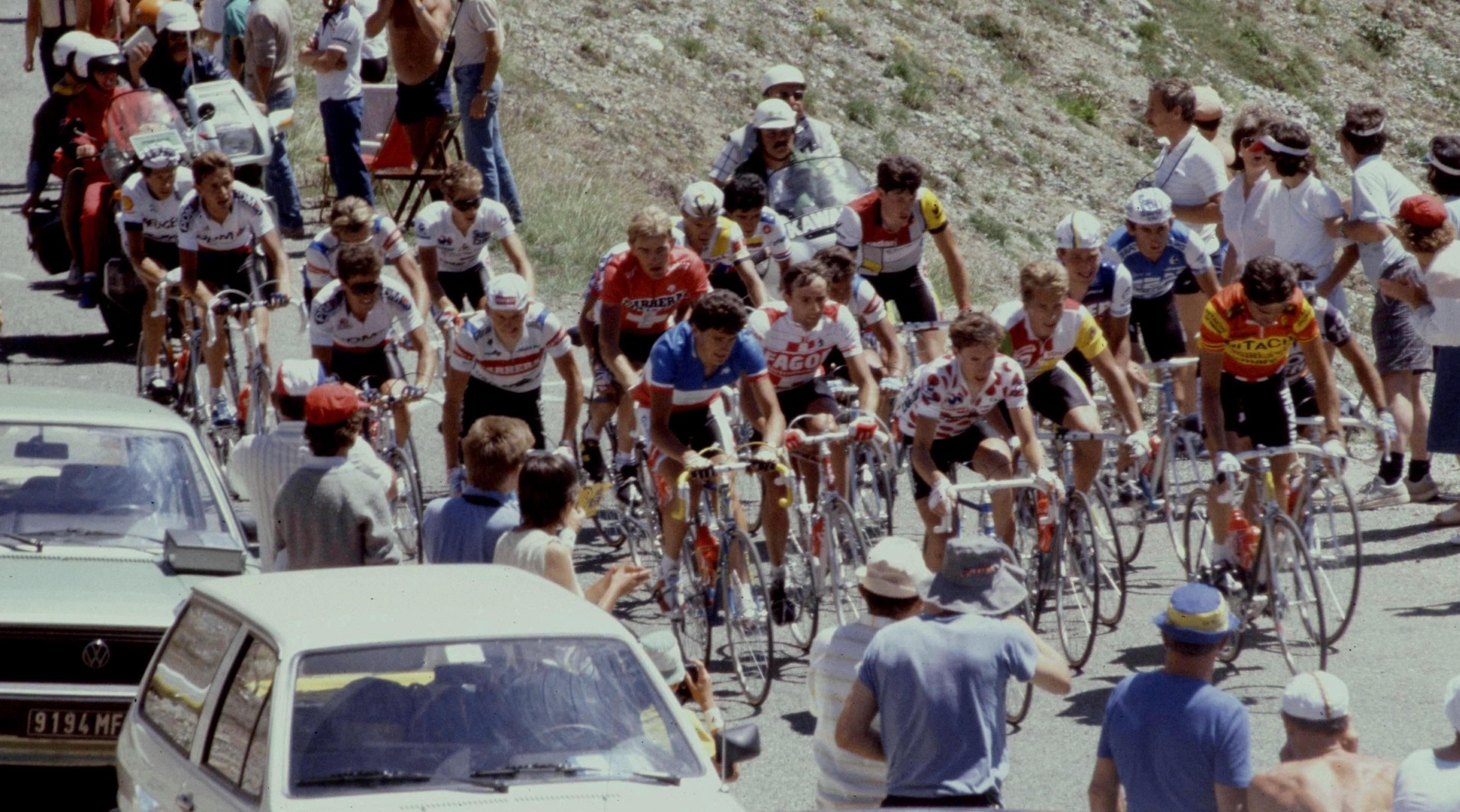 Hautes-Alpes Col De L'Izoard Tour de France 071986